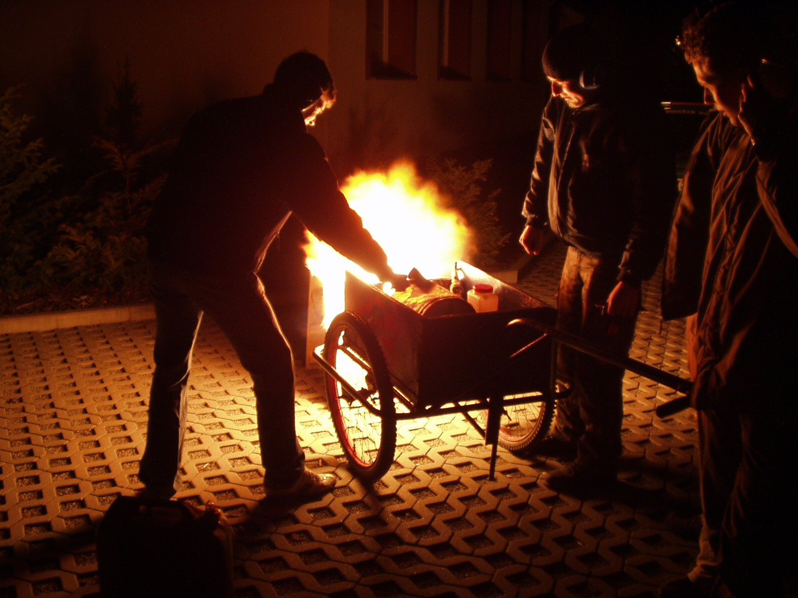 Mitglieder des Bröthener Jugendklubs beim alljährlichen Osterschießen.